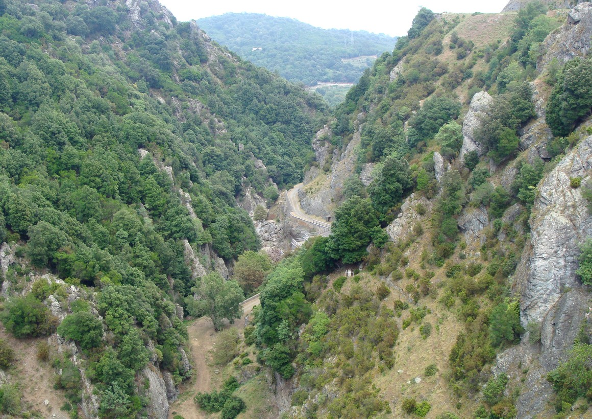 La vallée du fleuve Alesani au pied du barrage.